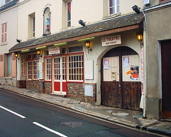 Théatre Saint Vincent, Jouy-le-Moutier on 03/03/06.